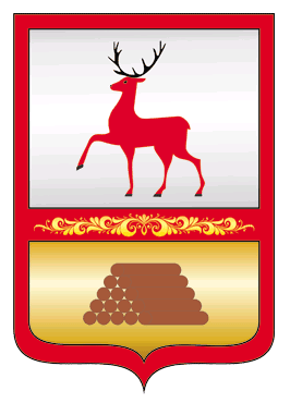 герб городского округа Семёновский Нижегородской области